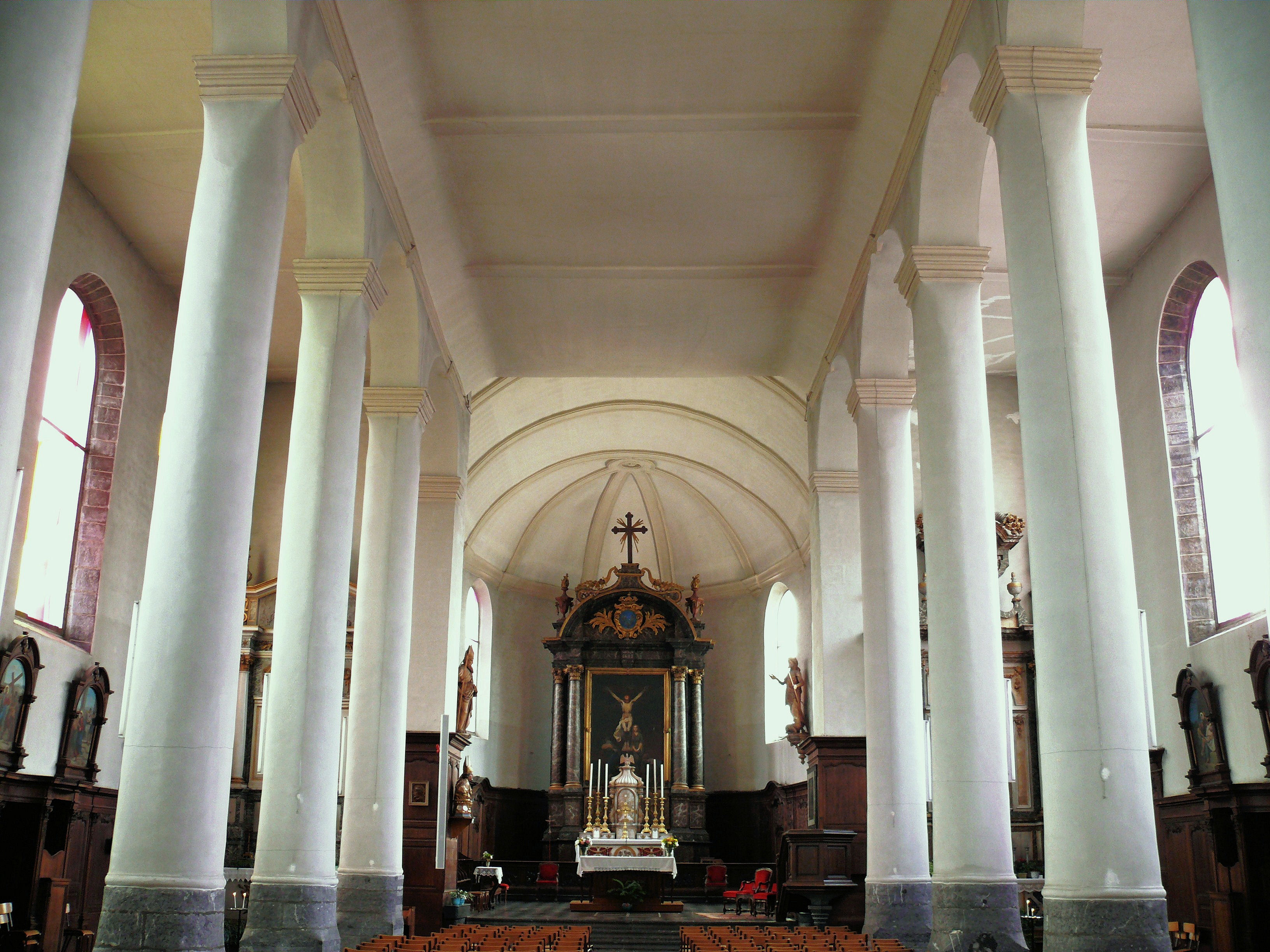 Givet - Eglise Saint-Hilaire - Nef, autel Vauban classé